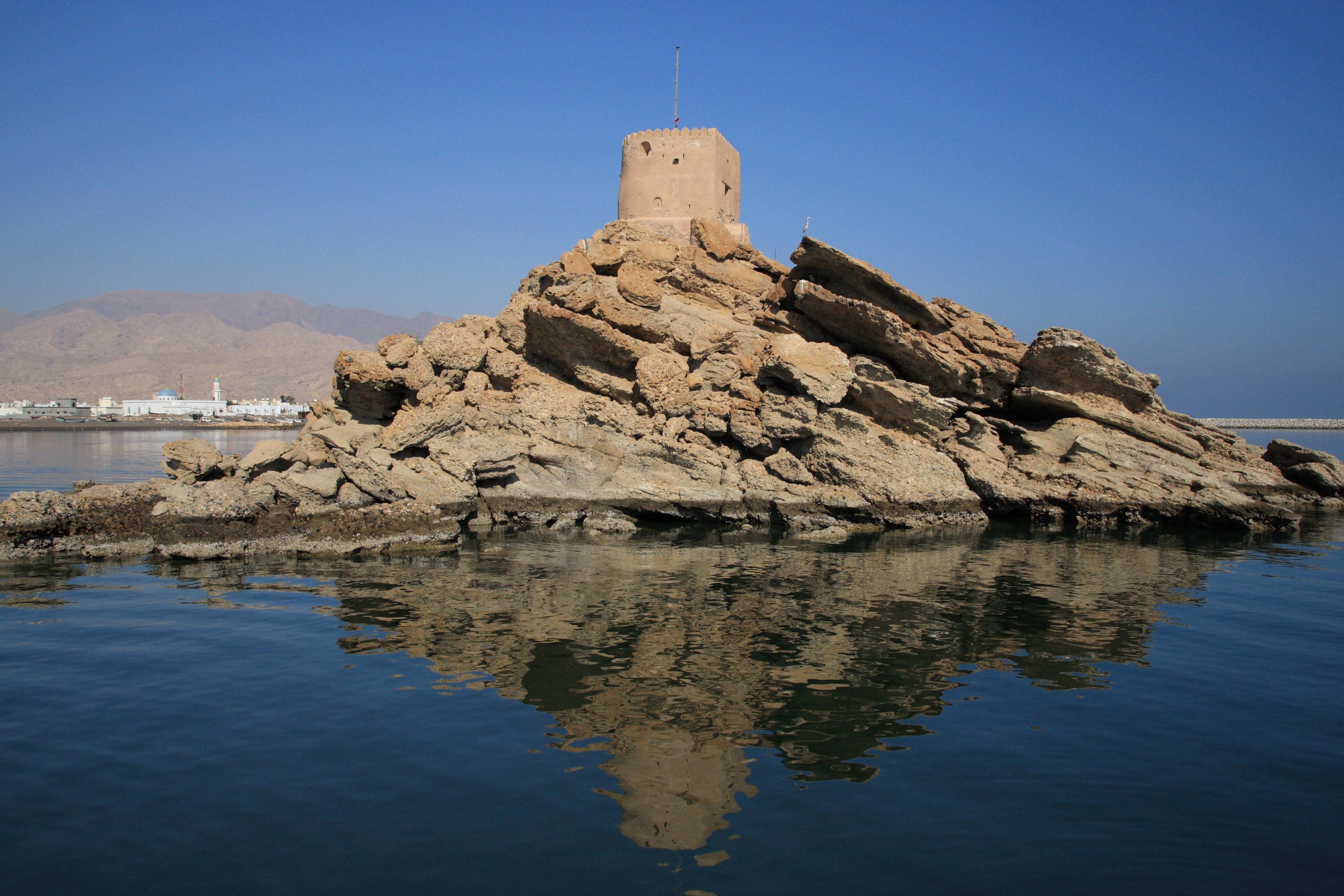 Al Sahel Fort, Quriyat, Muscat, Oman